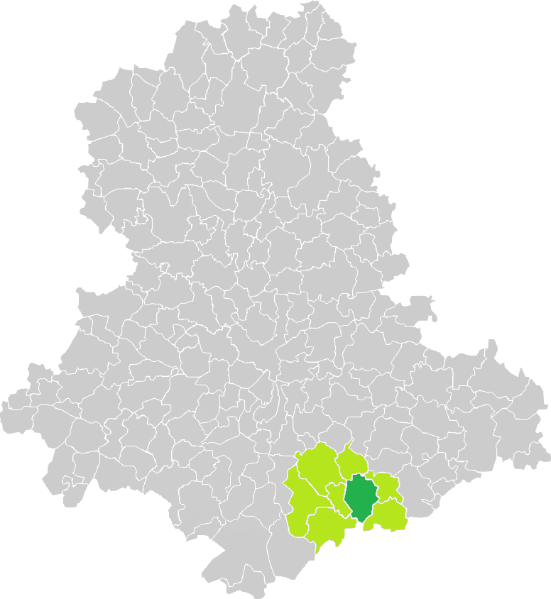 Carte de situation de la commune de Saint-Germain-les-Belles (en vert foncé) dans le votre Canton (en vert clair) sur une carte des communes de la Haute-Vienne